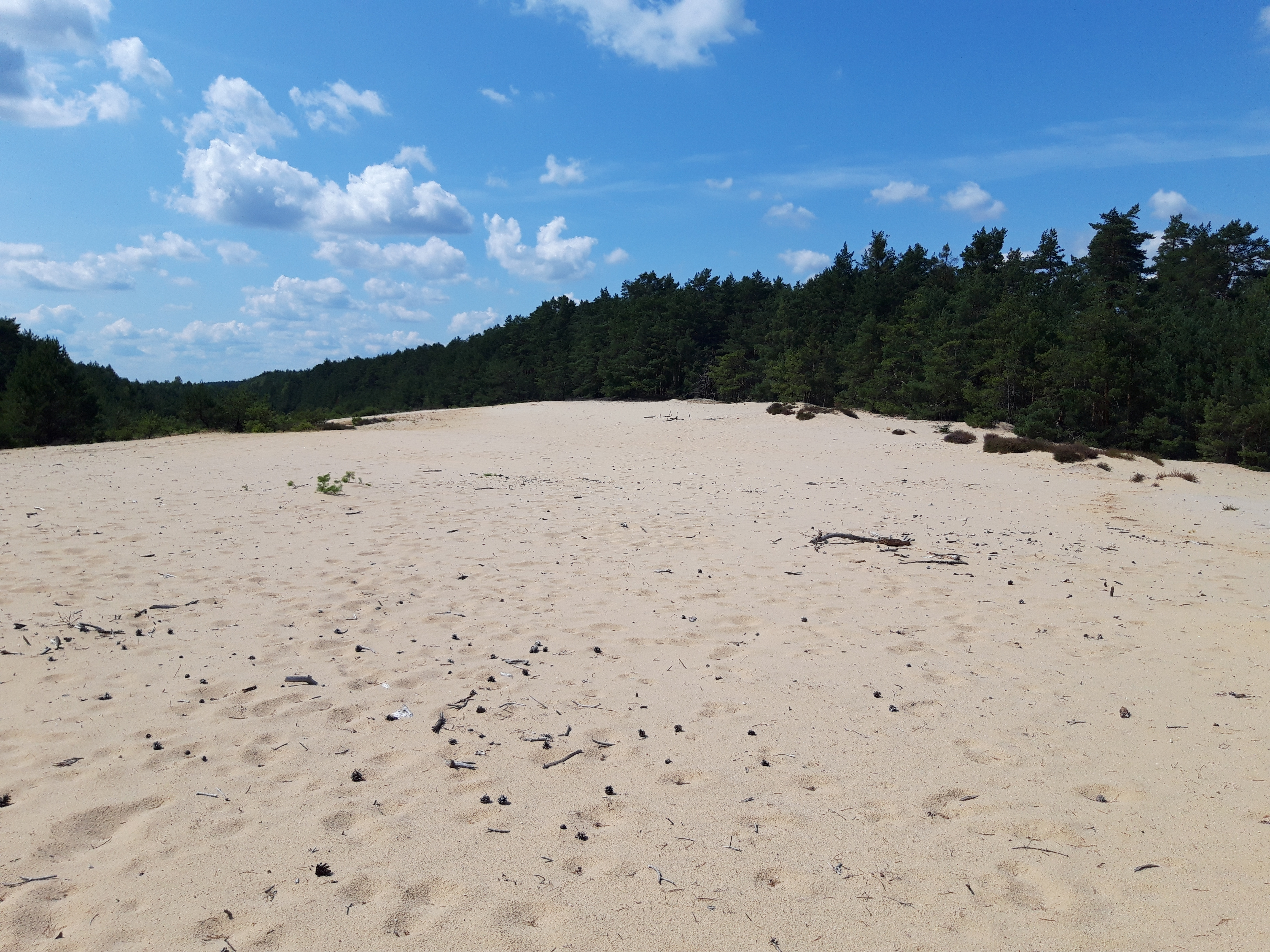 Ruchome wydmy śródlądowe w Wilkocinie.